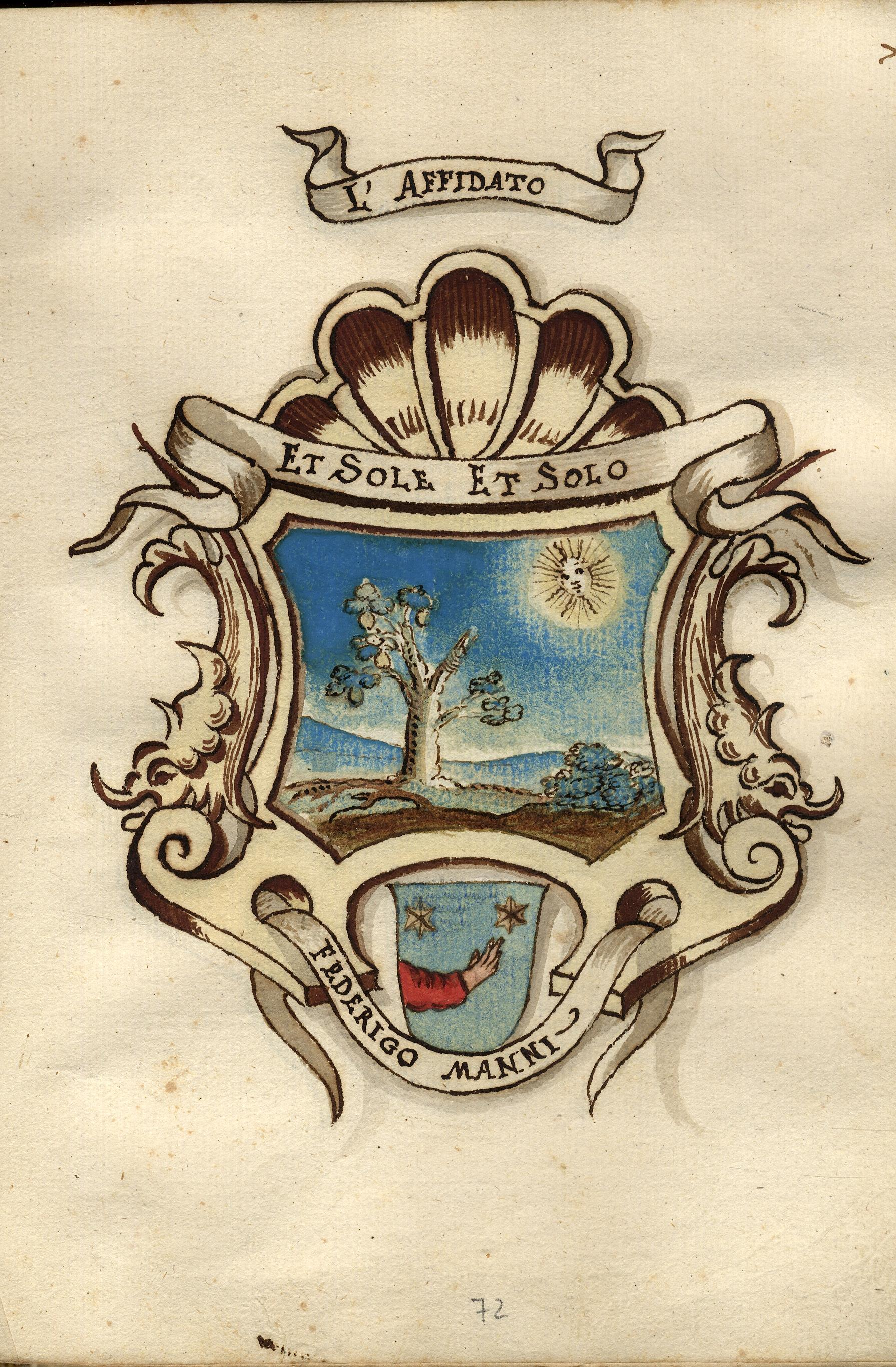 sono l'autore Licensing Categoria:Immagini esclusivamente in GNU FDL